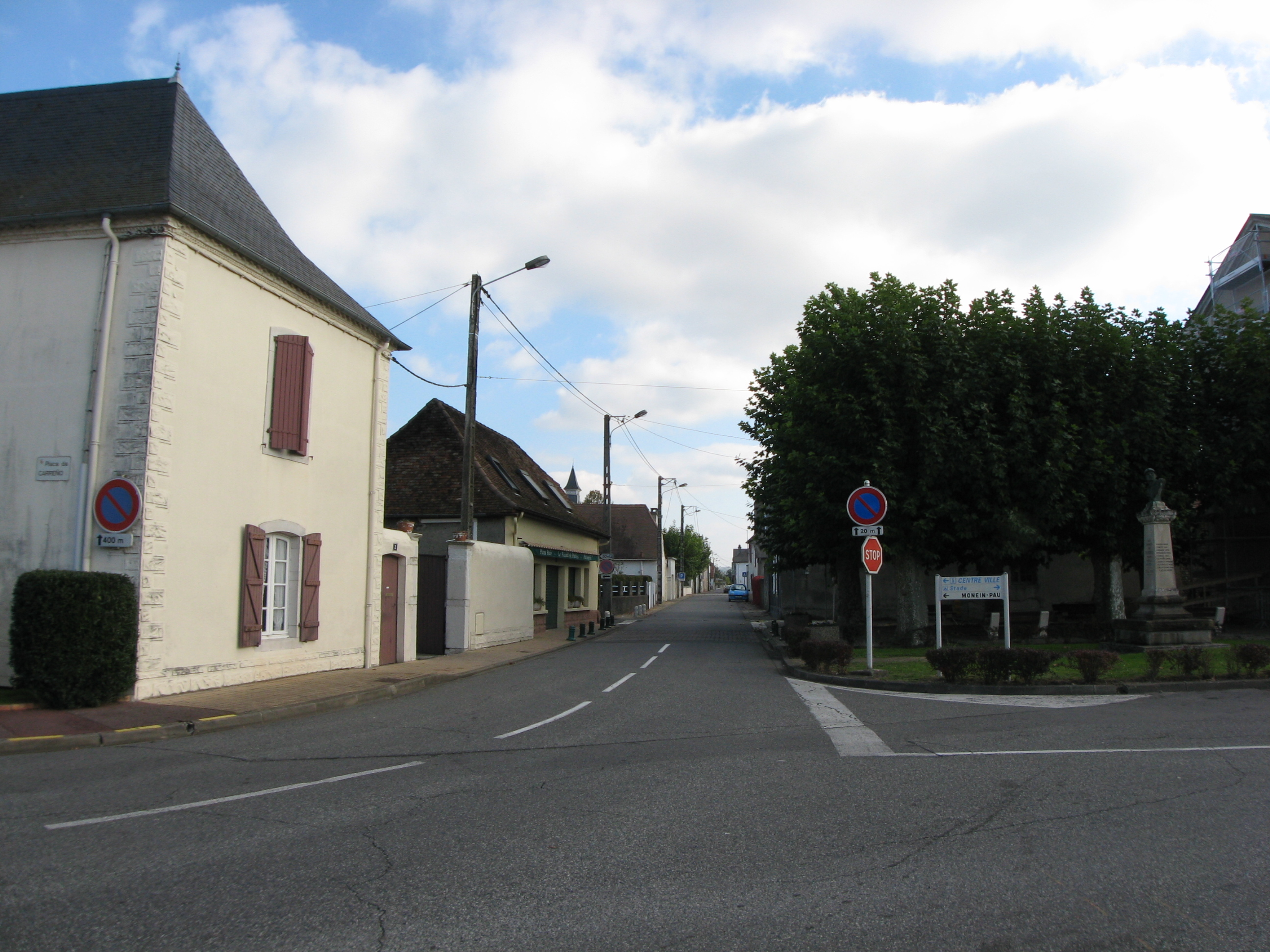 Vue de la rue principale de Pardies (Pyrénées-Atlantiques) Pyrénées).